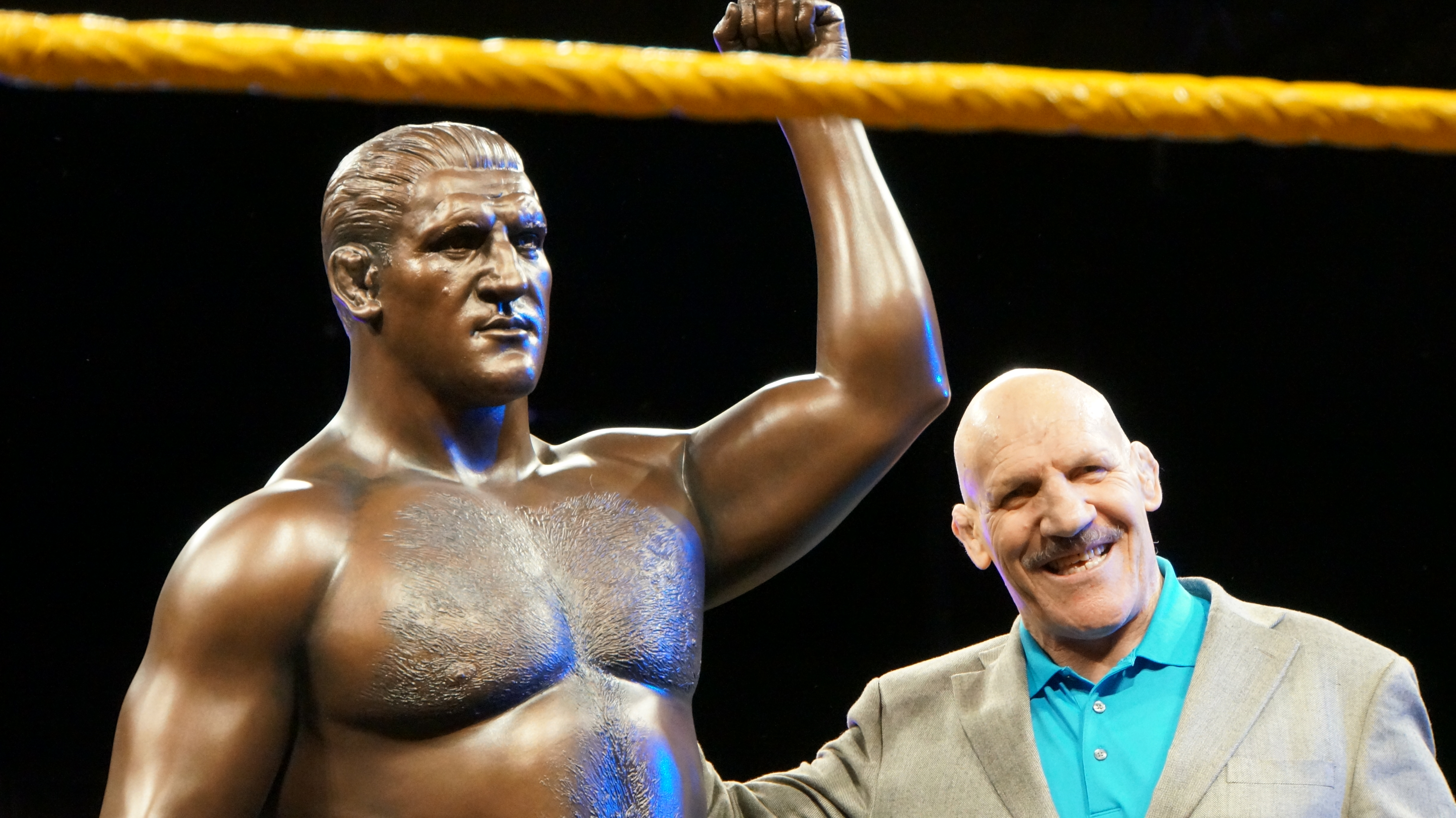 2014-04-03_19-32-46_NEX-6_DSC05992